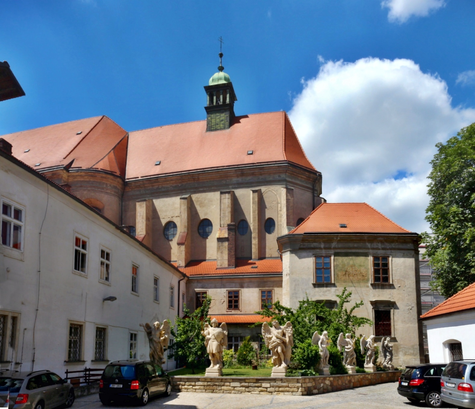 Brno, Orlí ulice - areál kláštera minoritů